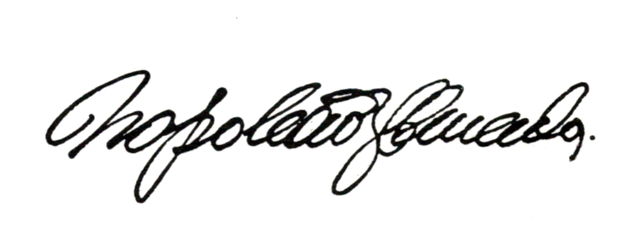 Assinatura do gramático brasileiro Napoleão Mendes de Almeida.